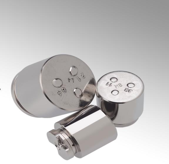 photos electroless nickel